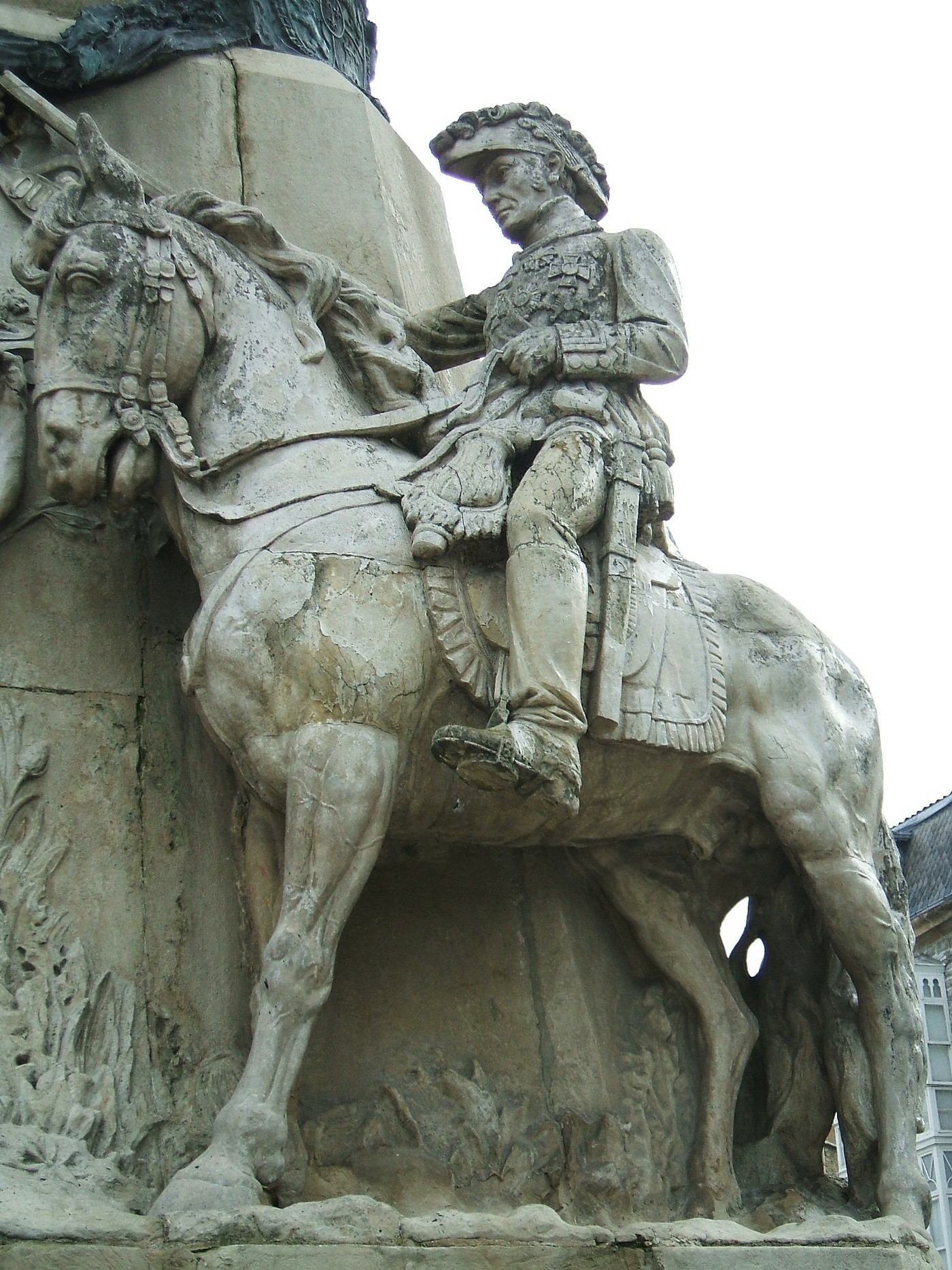 El general Miguel Ricardo de Álava, en el Monumento a la Batalla de Vitoria (1813), en la Plaza de la Virgen Blanca de Vitoria-Gasteiz, País Vasco, España